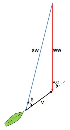 Hoek SW en WW met zeilboot